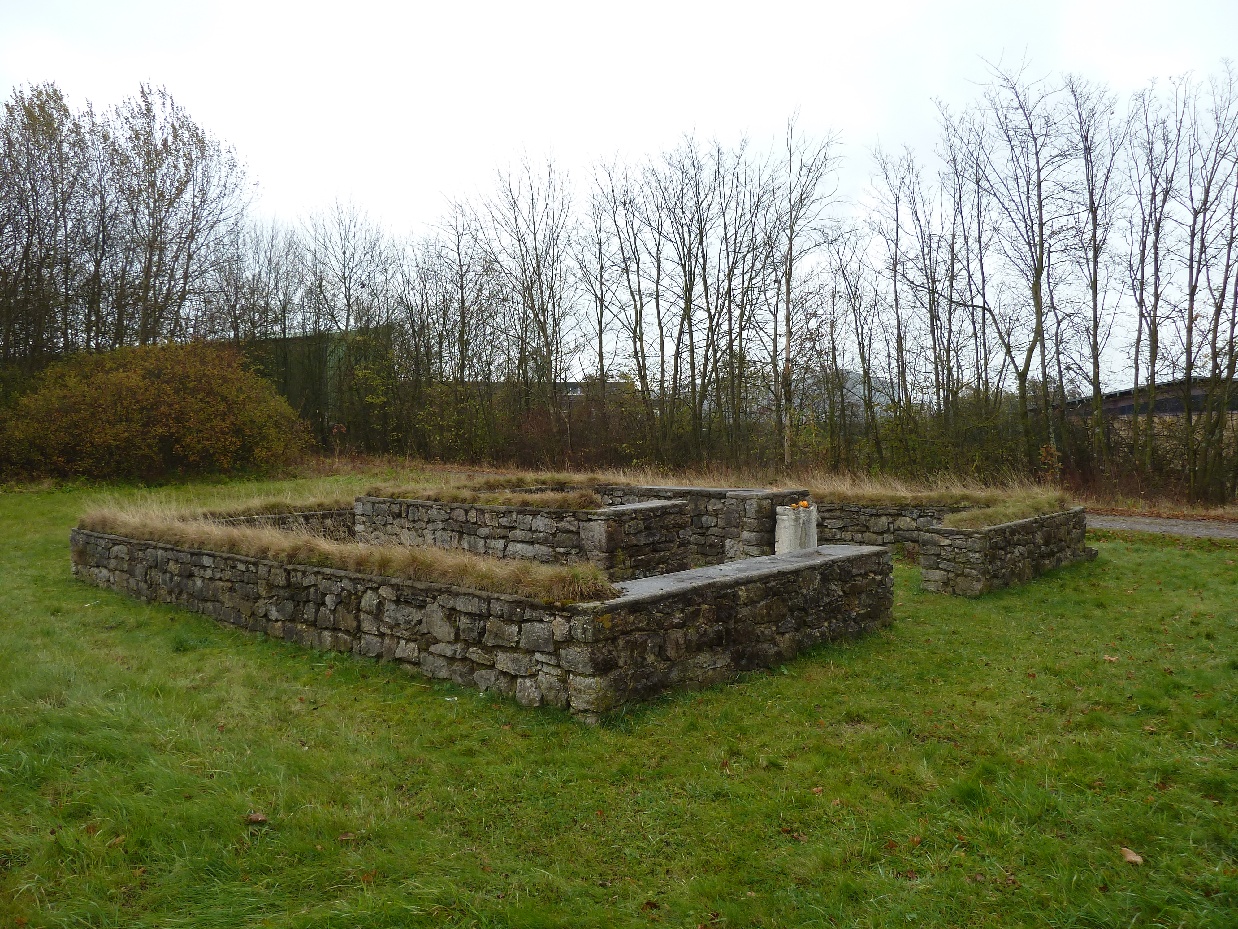 Tempelheiligtum Zingsheim, Nettersheim, Deutschland